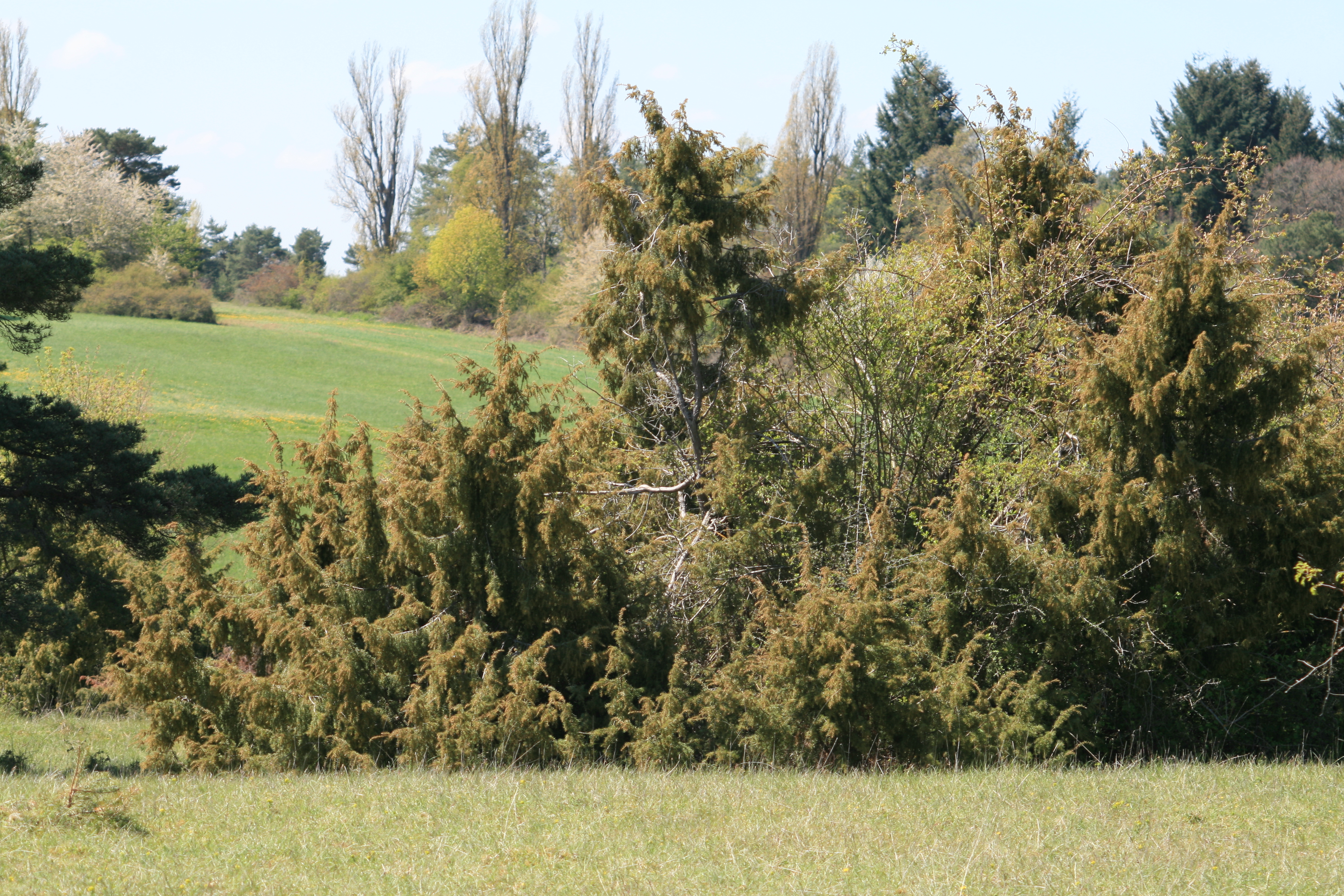 Wacholder am Betzenbuckel, Naturschutzgebiet Betzenbuckel